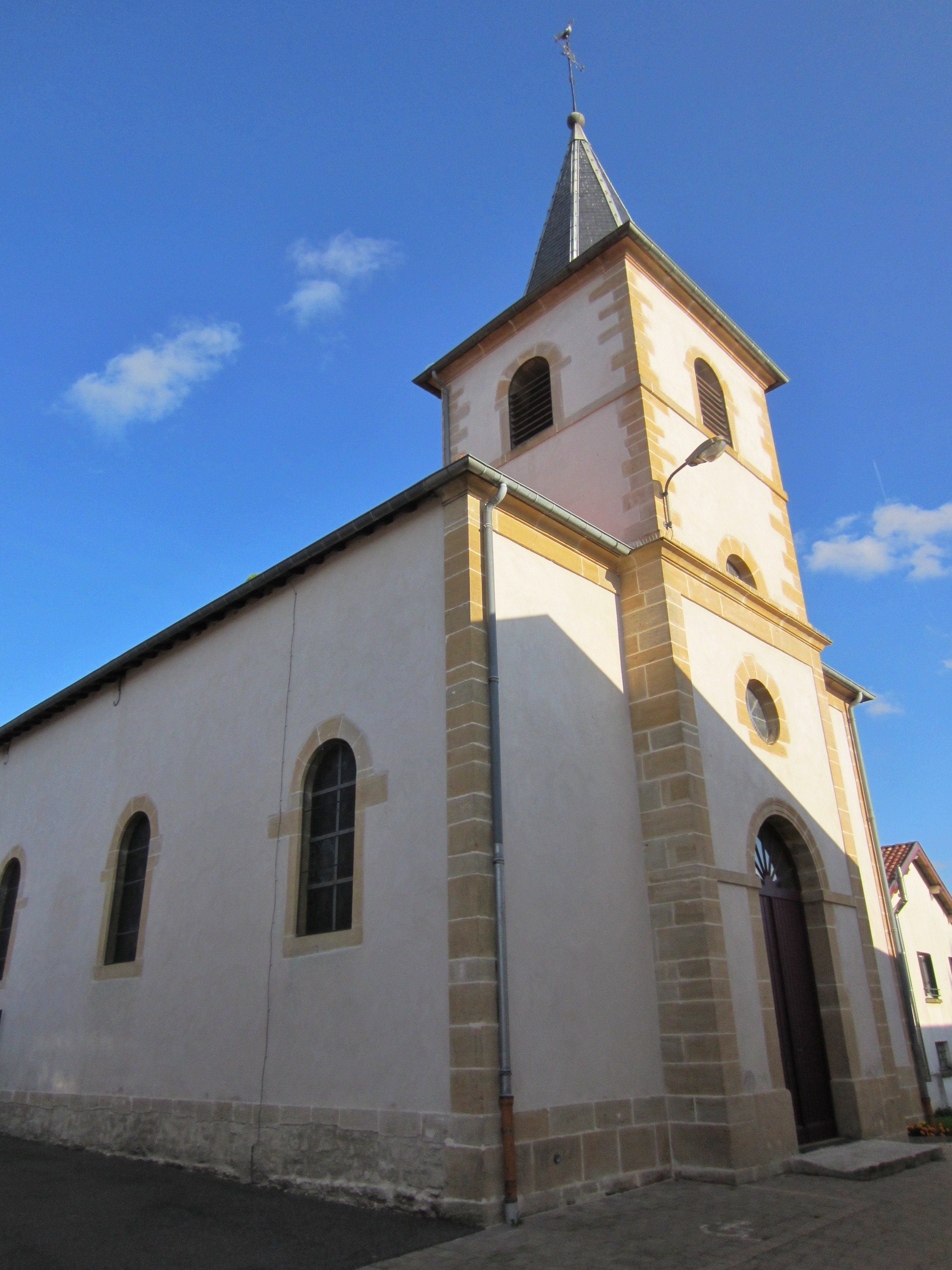 Description eglise Ozerailles eglise Ozerailles